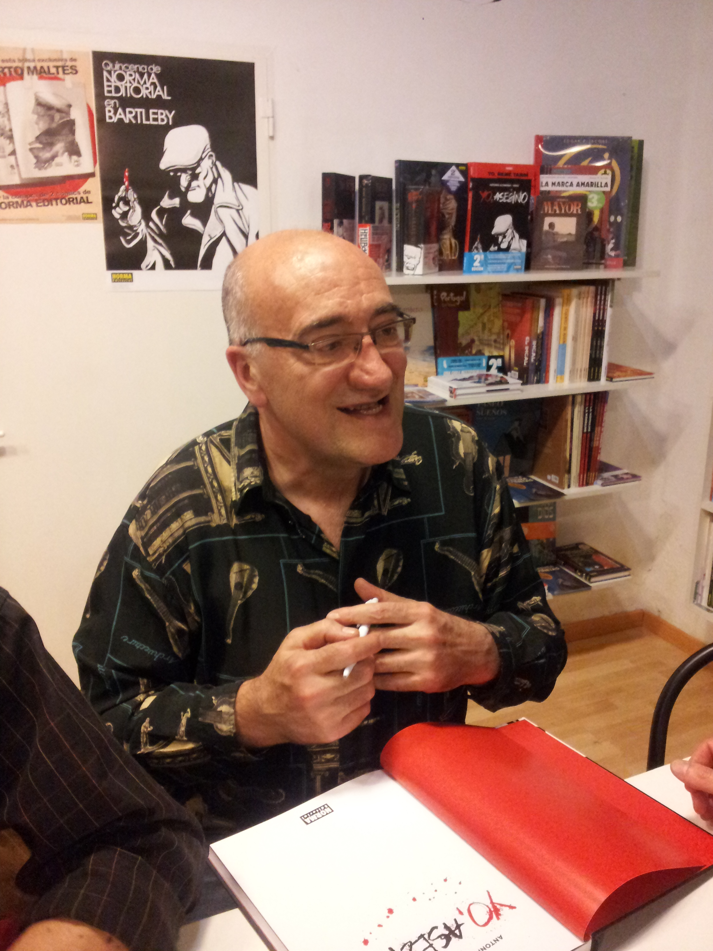 Presentació de "Yo, asesino" a València.